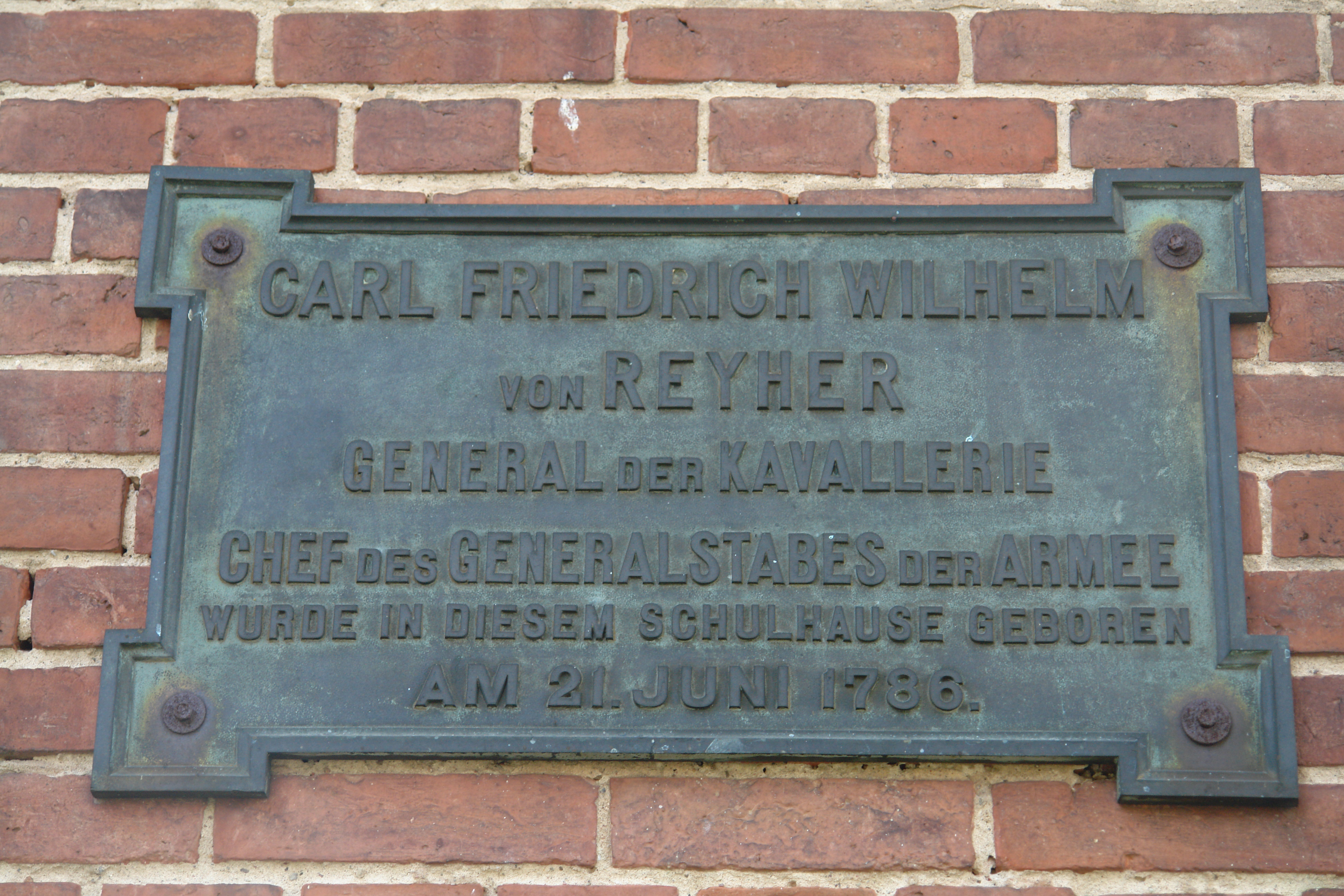 Gedenktafel für den General der Kavallerie Karl von Reyher (1786-1857) an seinem Geburtshaus, Groß Schönebeck. Das Gebäude ist die ehemalige Dorfschule und dient heute als evangelisches Gemeindezentrum.